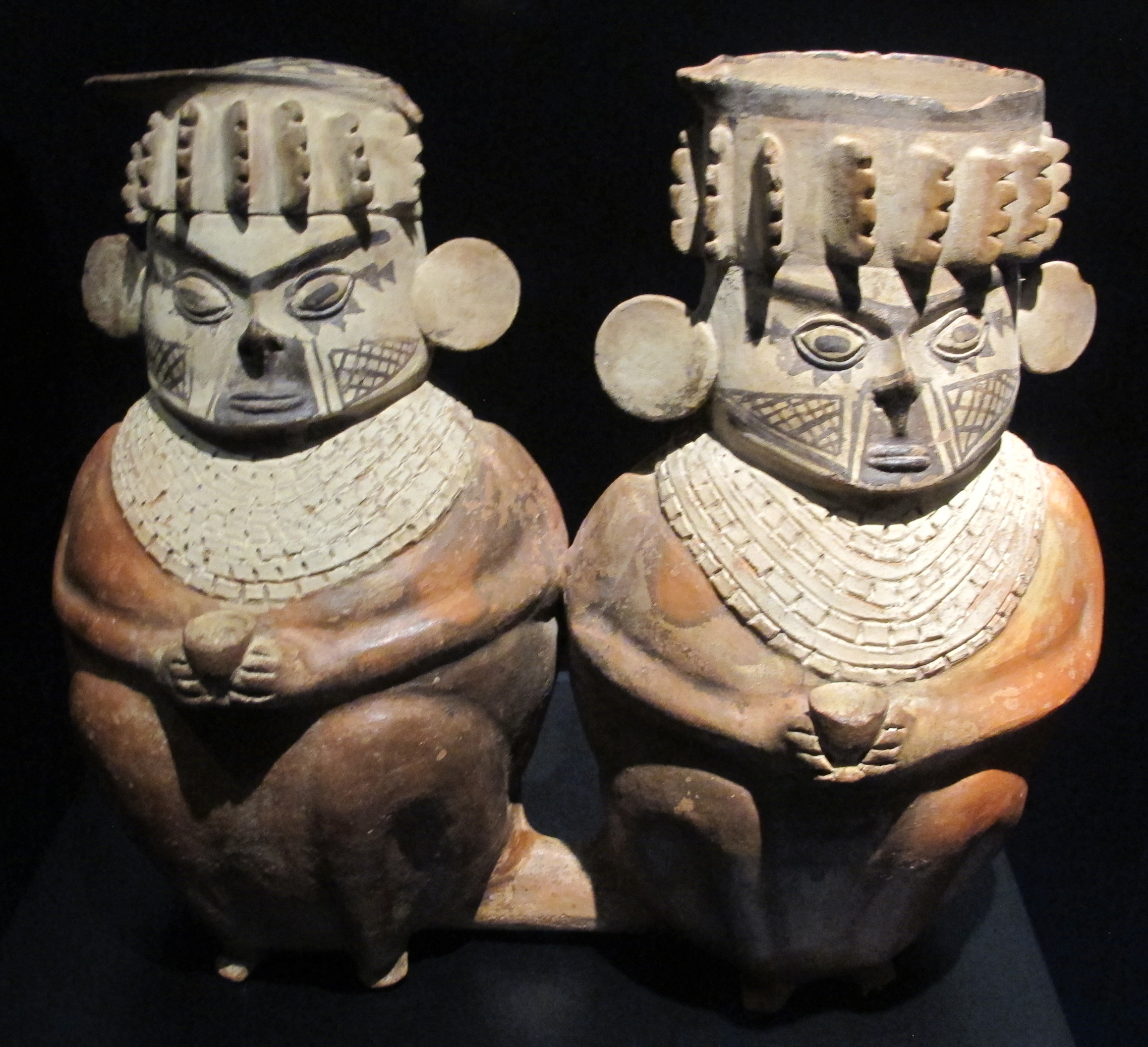 Musée du quai Branly